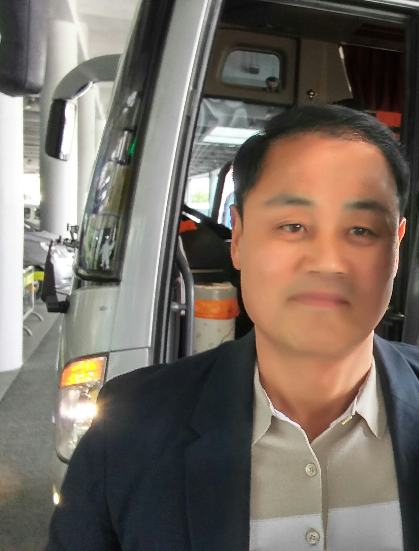 강원 감독 최윤겸 감독